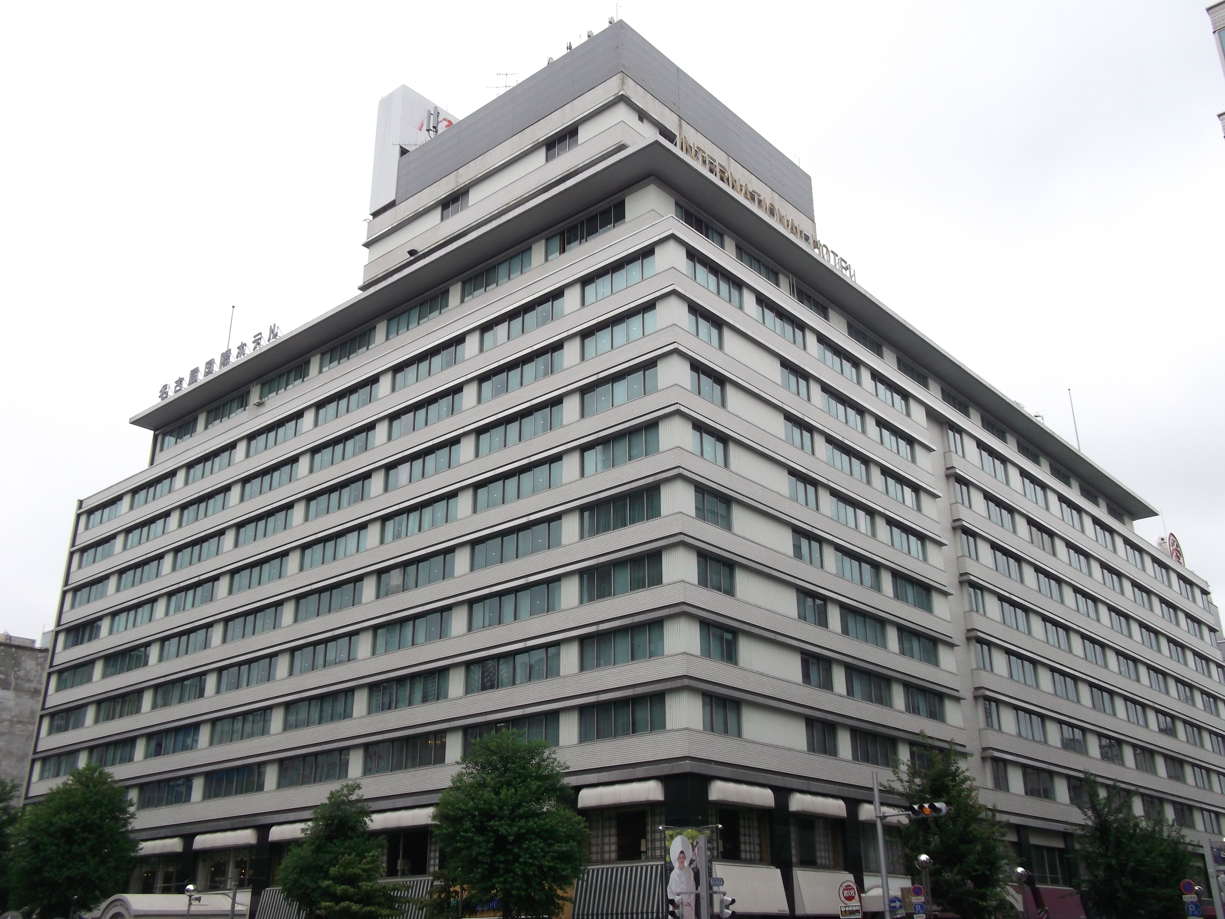 名古屋市中区錦の名古屋国際ホテルを北側公道西側より撮影